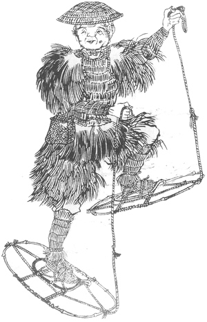 "Kanjiki" (かんじき, Japanese snowshoe) from the Hokuetsu Seppu (北越雪譜)